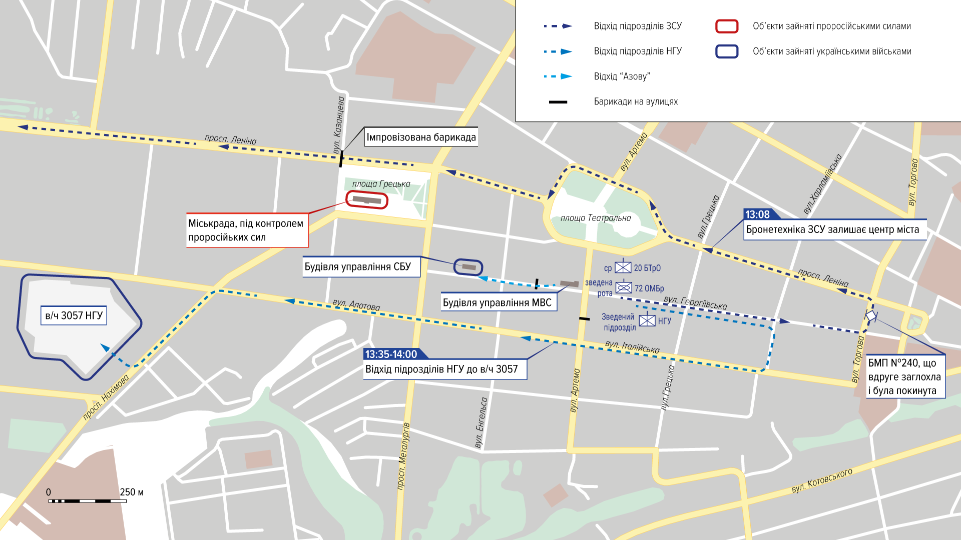 Бої в Маріуполі 09.05.2014/ Українські війська відходять з центру міста.